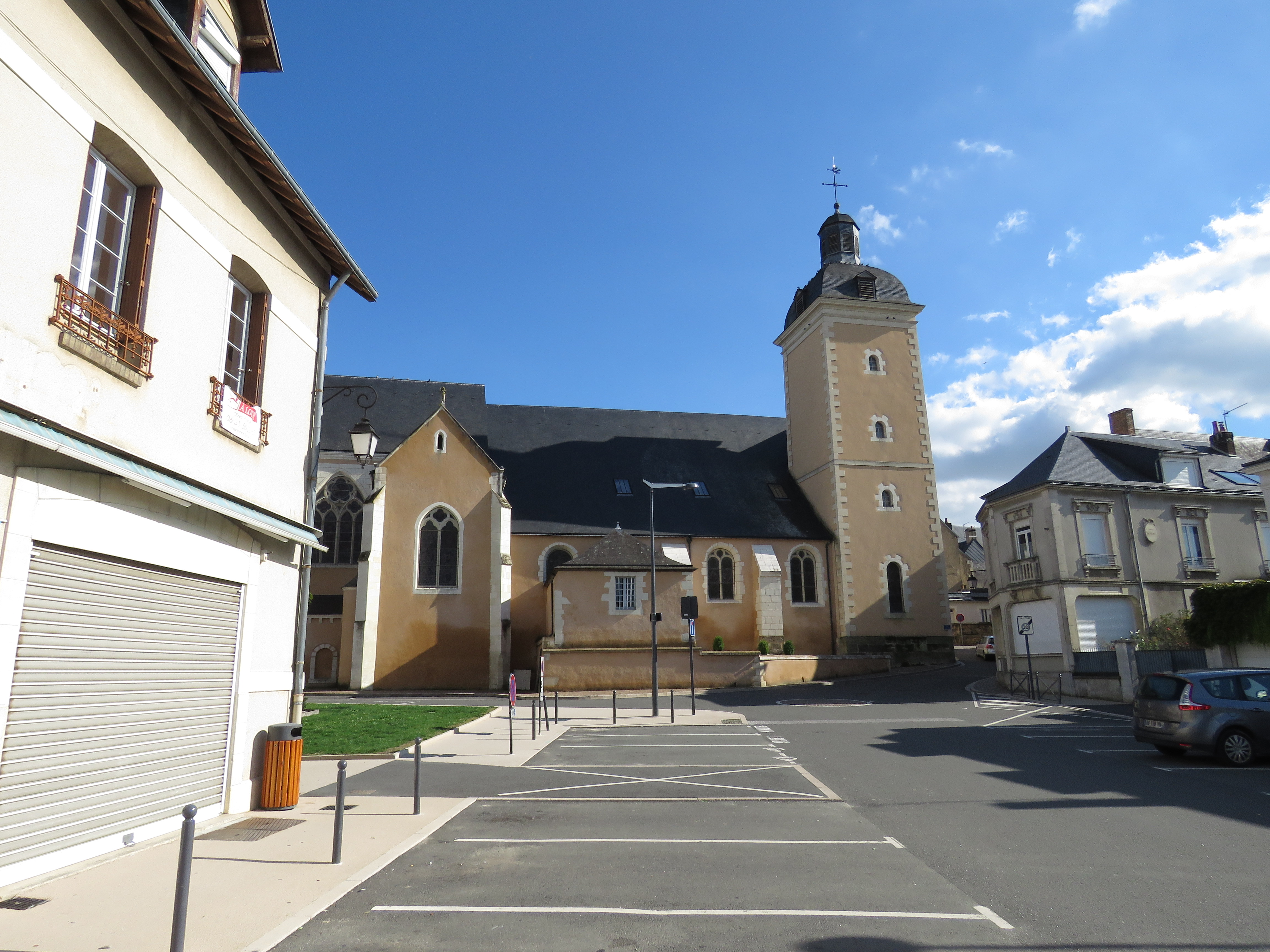 Église Saint-Guingalois de Château-du-Loir. .